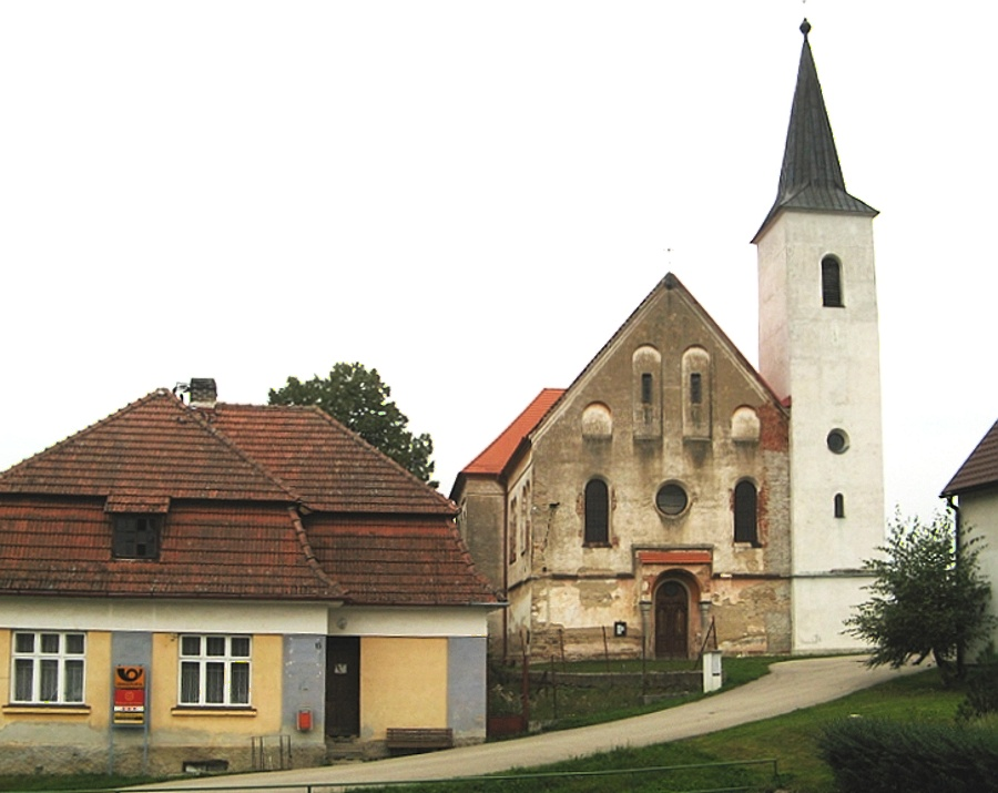 Kostel svaté Alžběty, Blažejov.